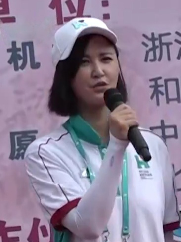 中文（中国大陆）: 2019年8月4日，“韩红爱心•百人援川”大型医疗援助公益活动启动仪式